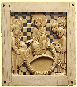 Maiestas Domini. Stifterbild aus der Gruppe der Magdeburger Elfenbeinplatten. Otto I. übergibt den Dom an Christus. Oberitalien (Mailand?), zwischen 962 und 973, New York, The Metropolitan Museum of Art, Gift of George Blumenthal 1941, Acc. Nr. 41 100 157.